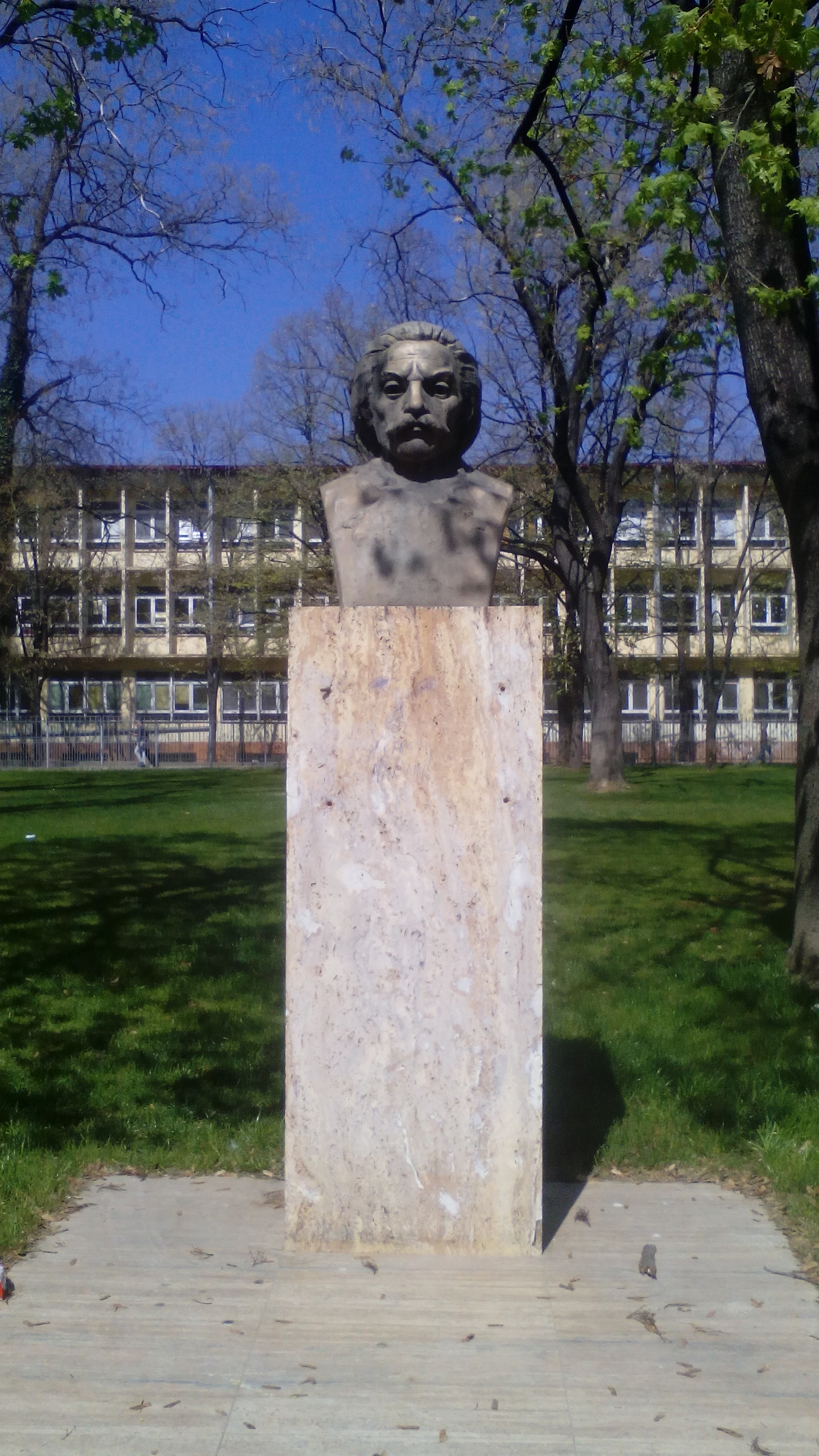 Биста на Андреја Дамјанов во дворот на Градежниот и Архитектонскиот факултет во Скопје